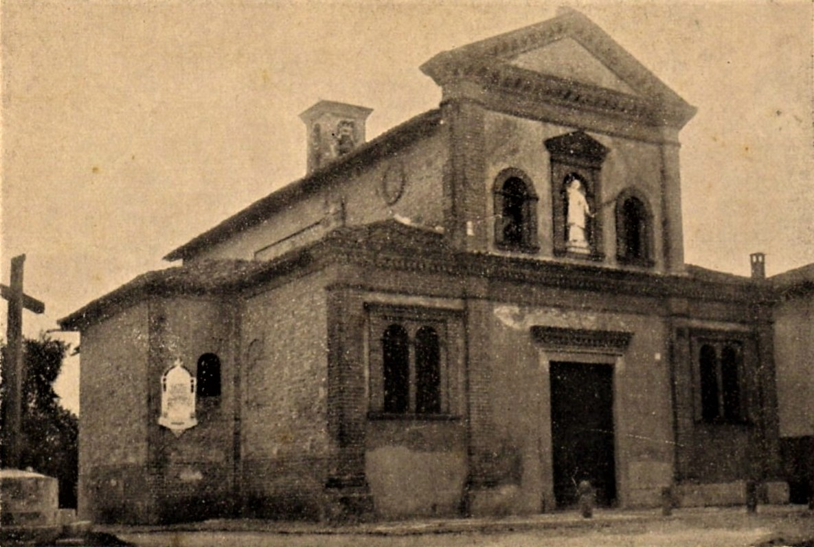 Immagine della chiesa di Sola risalente al 1945, quando ancora non era stato costruito il battistero (1946). Da notare la presenza della croce eretta durante l'Anno Santo della Redenzione (1933)